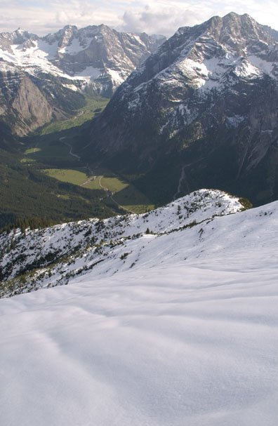 Gamsjoch (rechts) und Ahornboden (links im Bild) vom Kompar aus gesehen.